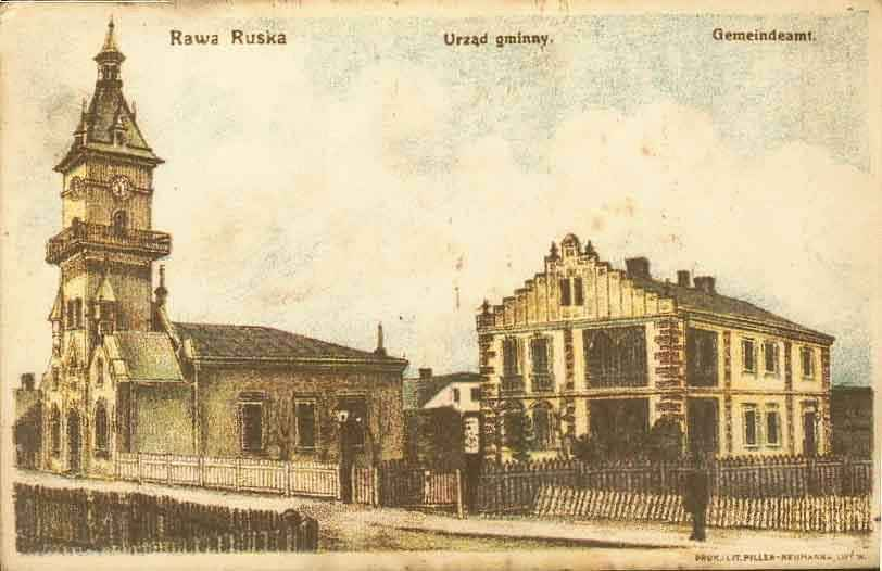 Рава-Русская. Управа гмины.